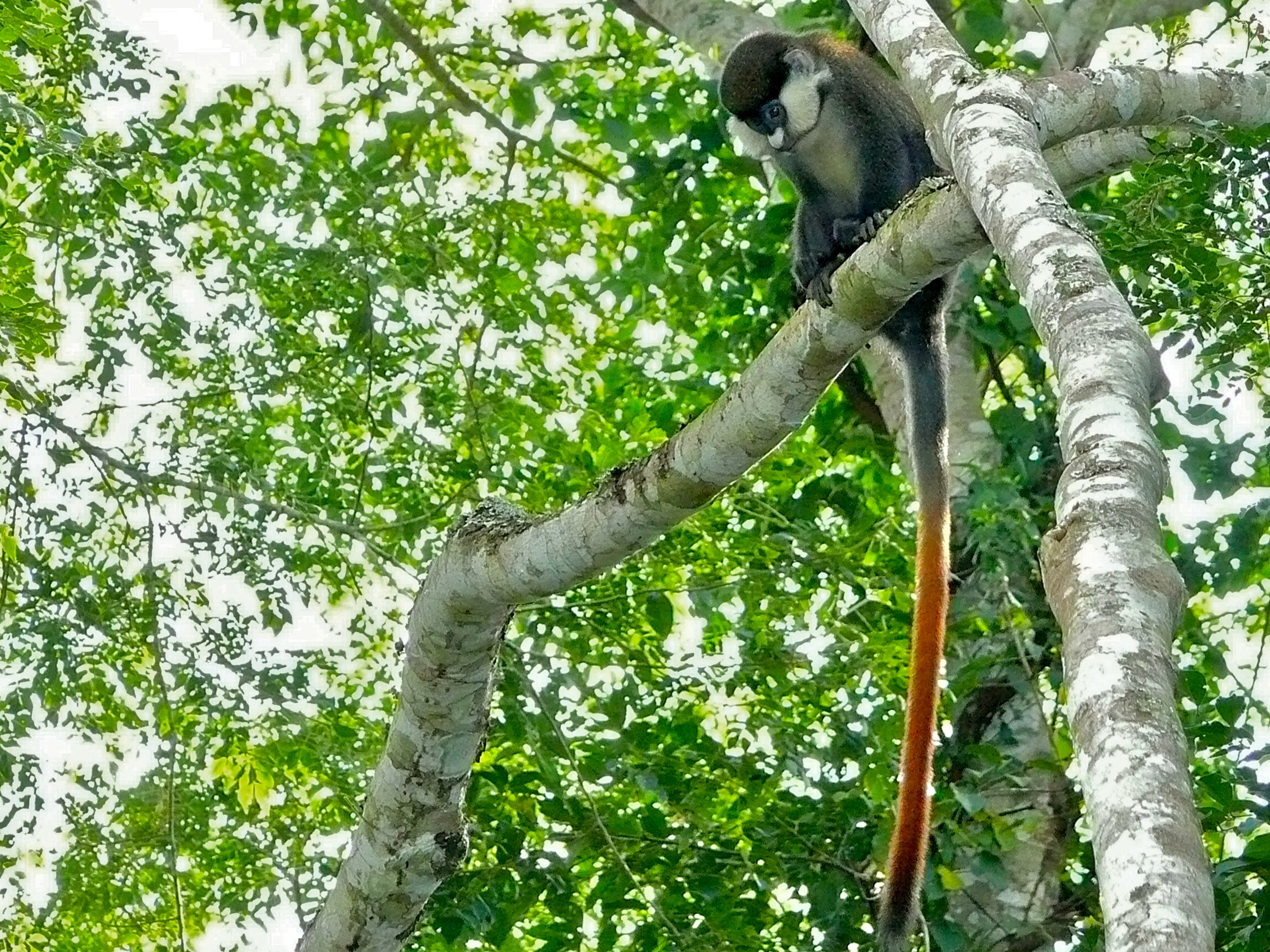 Kibale Forest NP, UGANDA